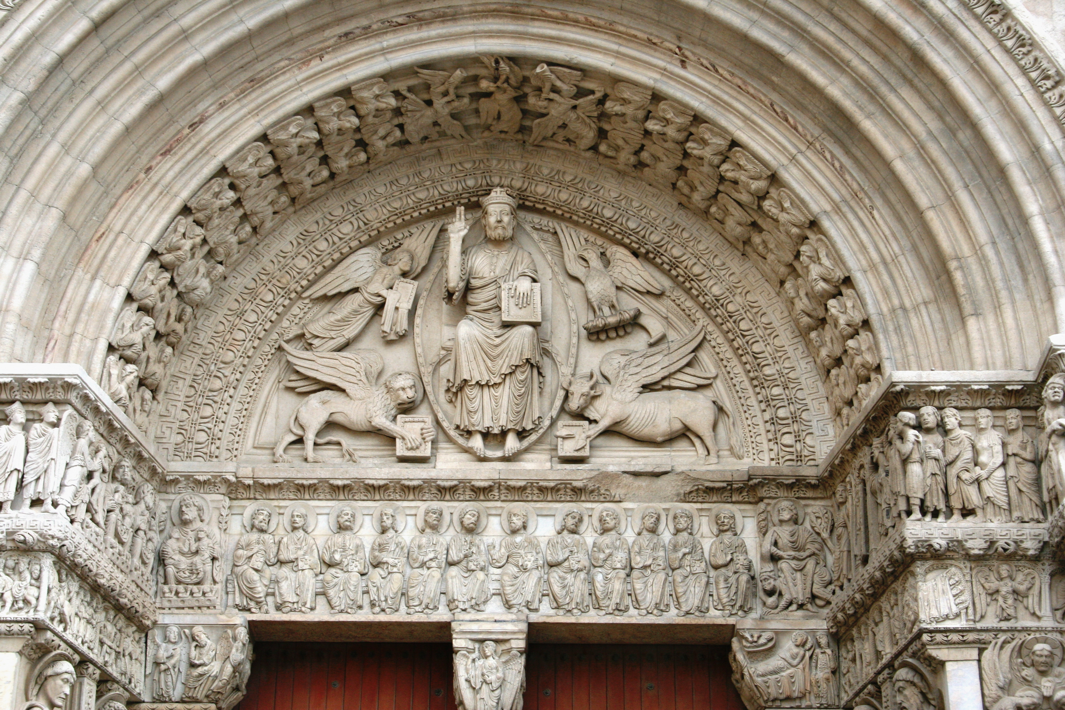 Tympan et frise du portail de l'église Saint-Trophime à Arles (XII° siècle)